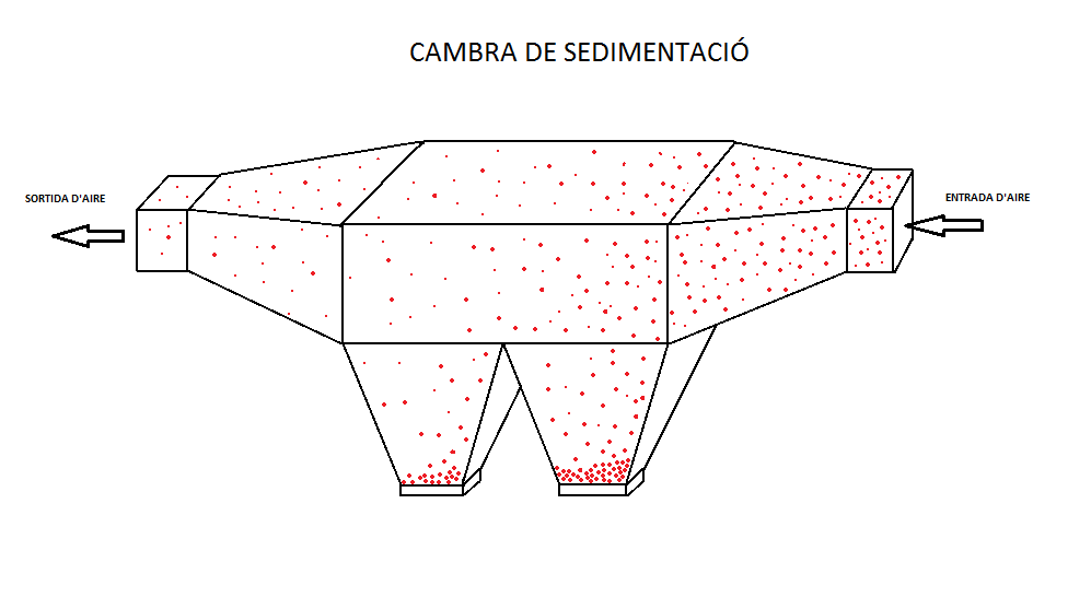 Es tracta d'una cambra de sedimentació per gravetat.